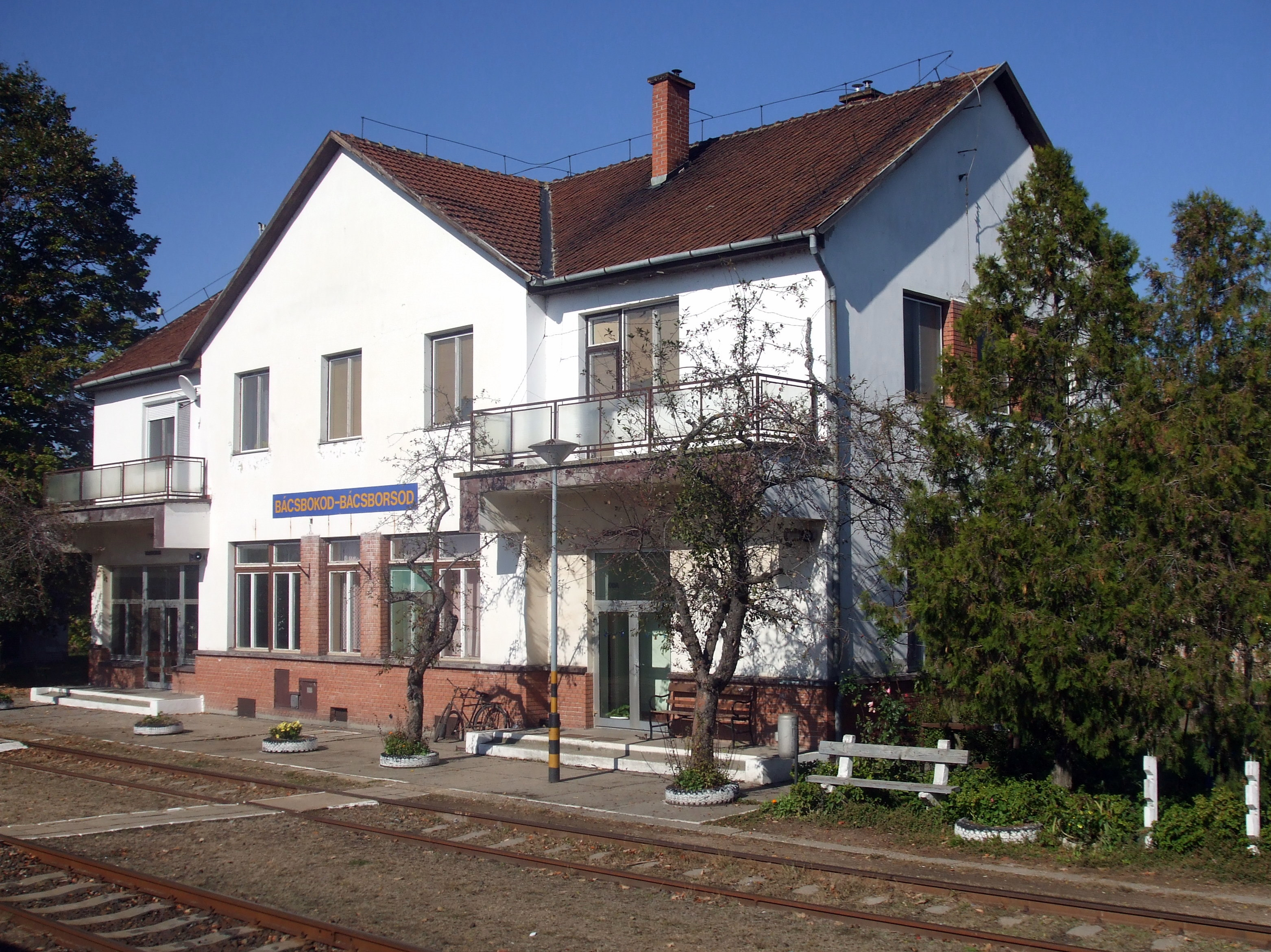 Bácsbokod-Bácsborsod vasútállomás a Bátaszék–Baja–Kiskunhalas-vasútvonalon